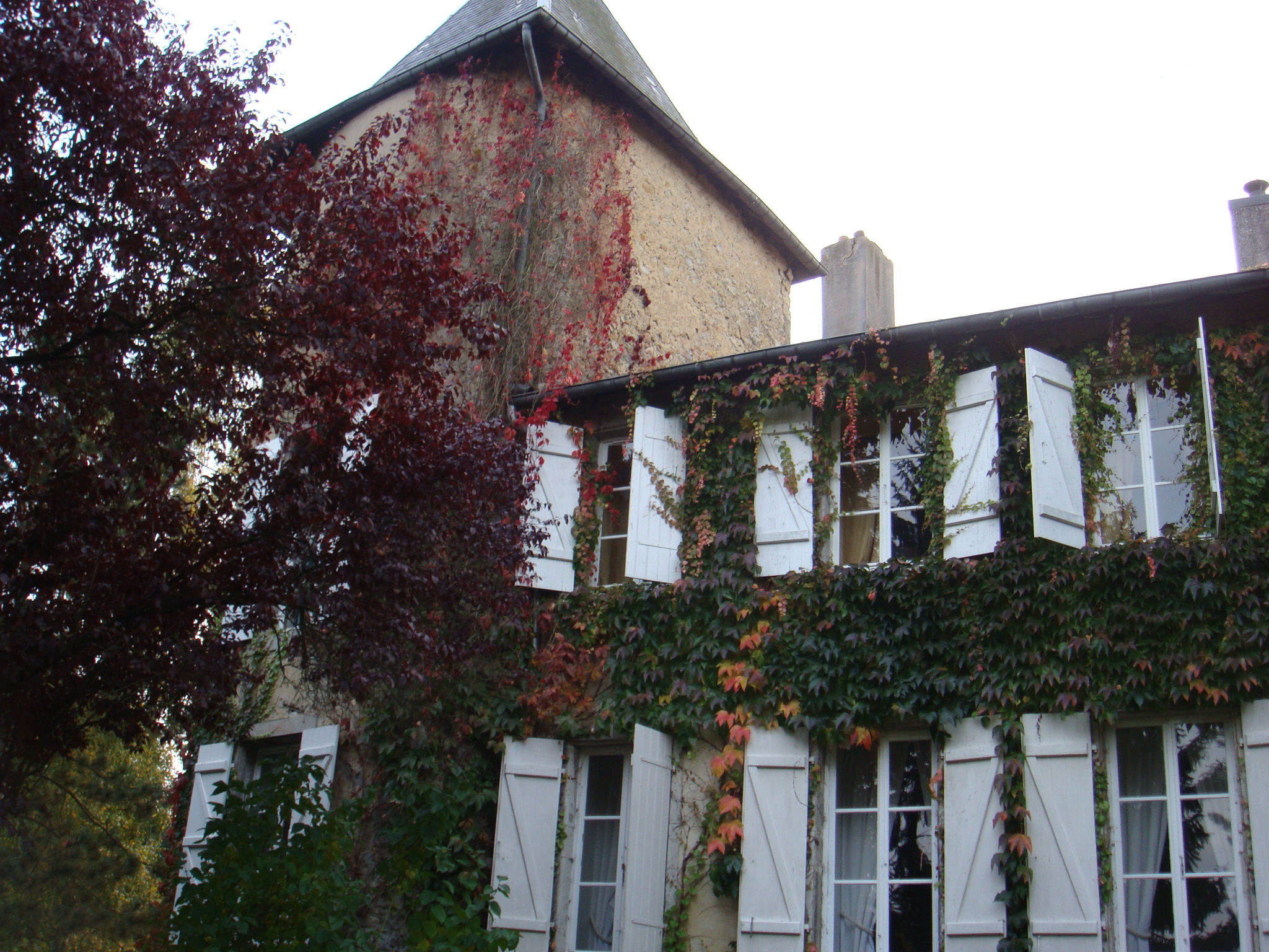 Façade nord-est du château et sa tour d'angle.